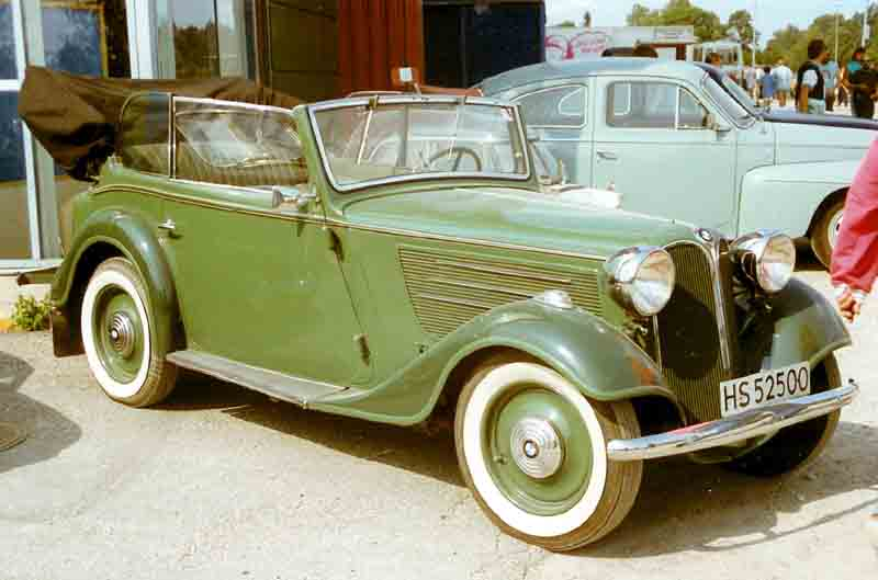 B.M.W. 319 Cabriolet